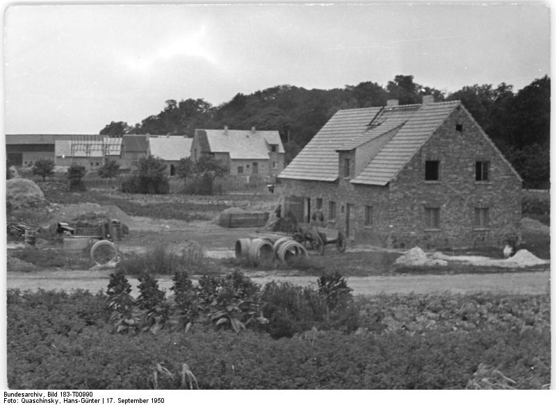 Breitenfeld, Blick auf das Neubauerndorf Ein Neubauerndorf bereitet sich zur Volkswahl vor. Das größte Neubauerndorf der Republik, Breitenfeld bei Leipzig, in welchem viele fortschrittliche ehemalige Umsiedler wohnen, bereitet die Volkswahlen am 15.10.1950 intensiv vor. UBz: Teilansicht des Dorfes.